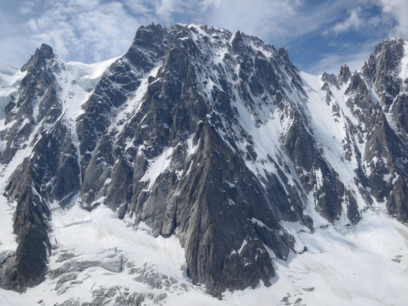 Versants nord et nord-est des Droites vus depuis le refuge d'Argentière, massif du Mont-Blanc (France)